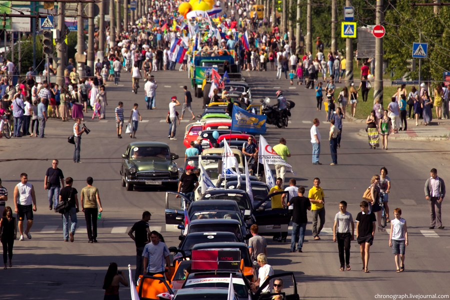 Колонна Автопарада на Дне Города Тольятти 2012